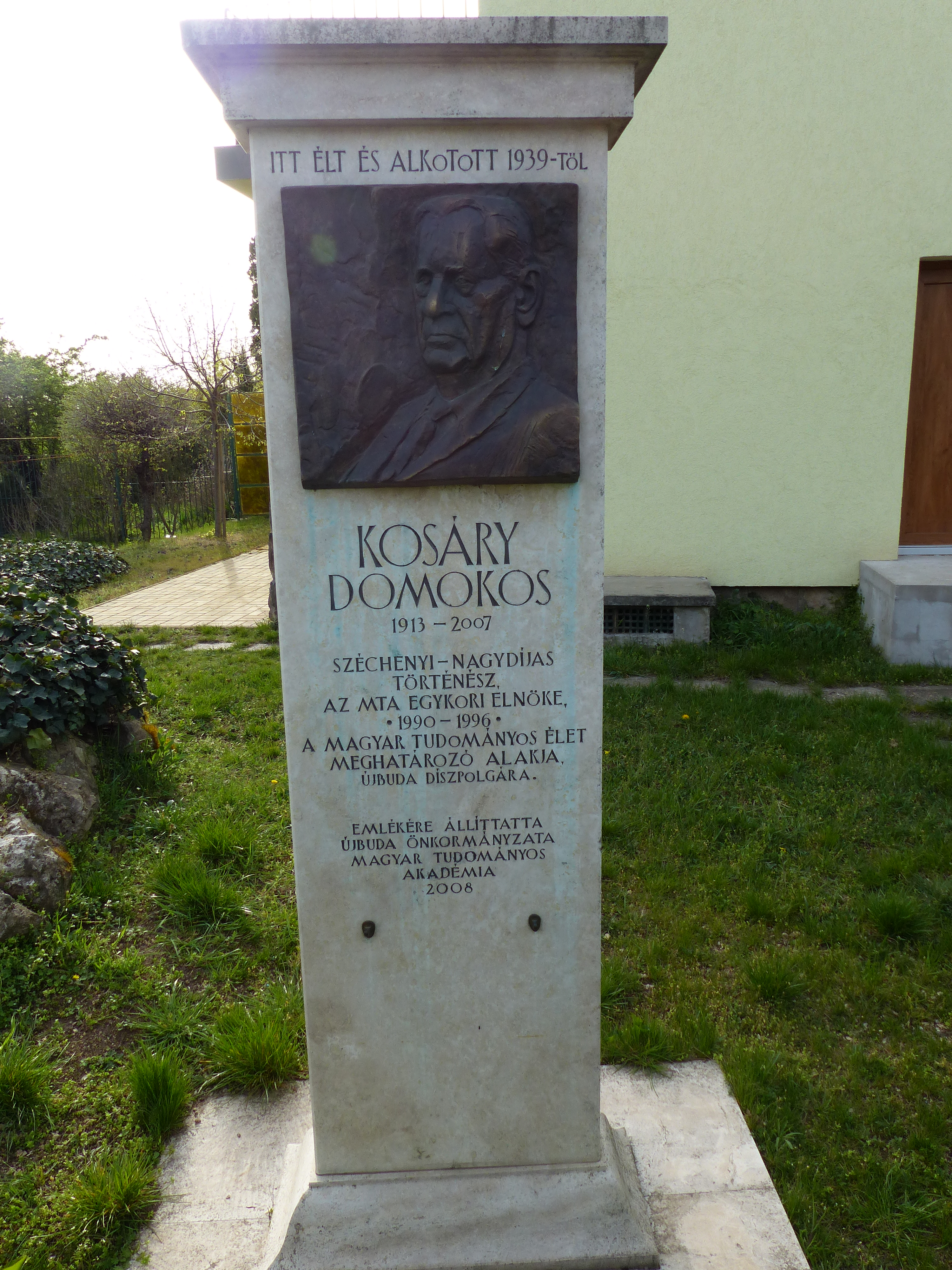 Kosáry Domokos emlékoszlopa. Budapest XI. kerület, Sashegy.